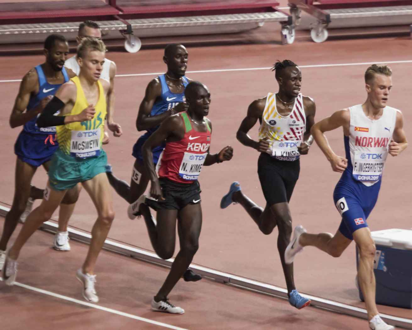 DOH10087 kimeli reeksen 5000m